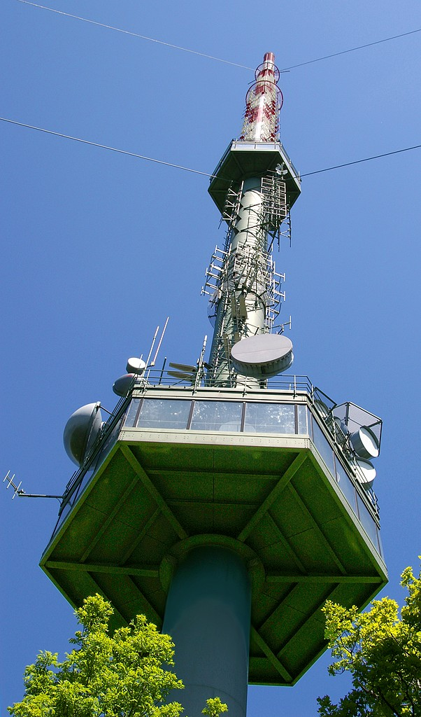 Sendemast Kahlenberg (Wien), oberer Teil